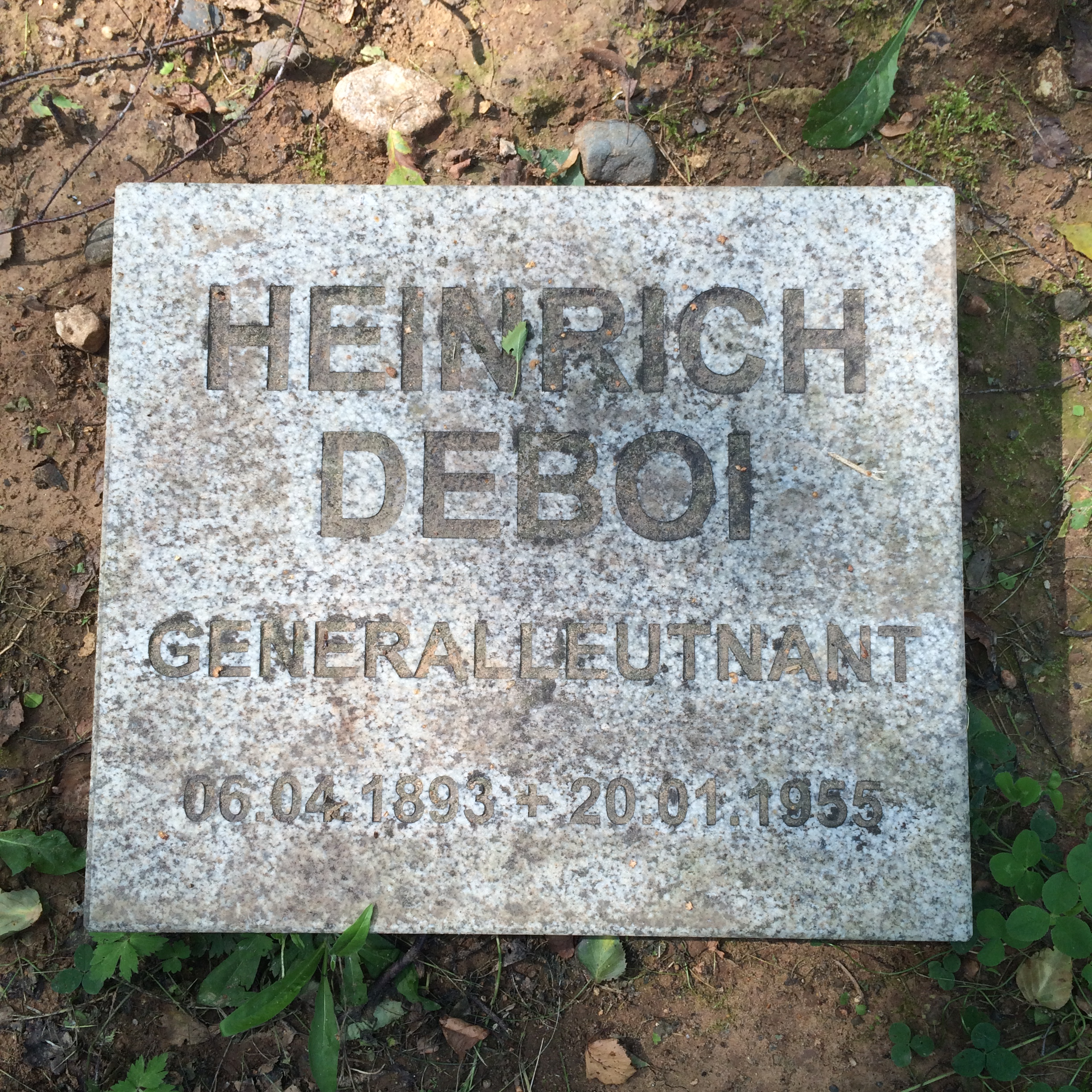 Tombstone; Cherntsy Memorial